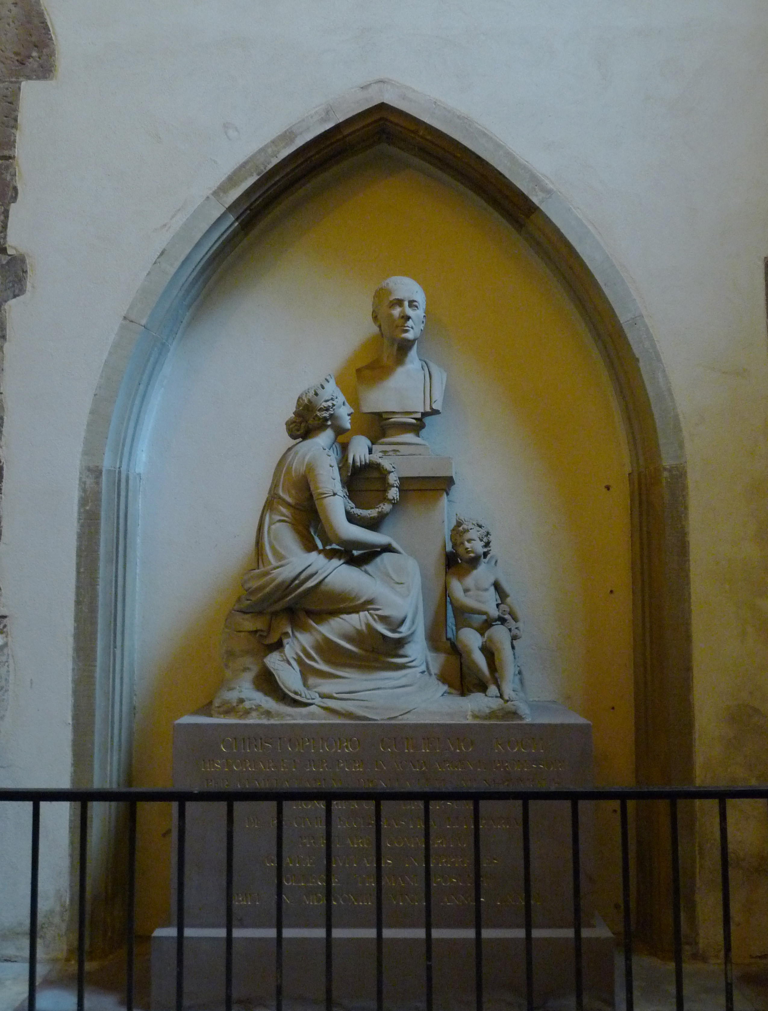 Monument funéraire du professeur Christophe-Guillaume Koch à l'église Saint-Thomas de Strasbourg (oeuvre de Landolin Ohmacht)